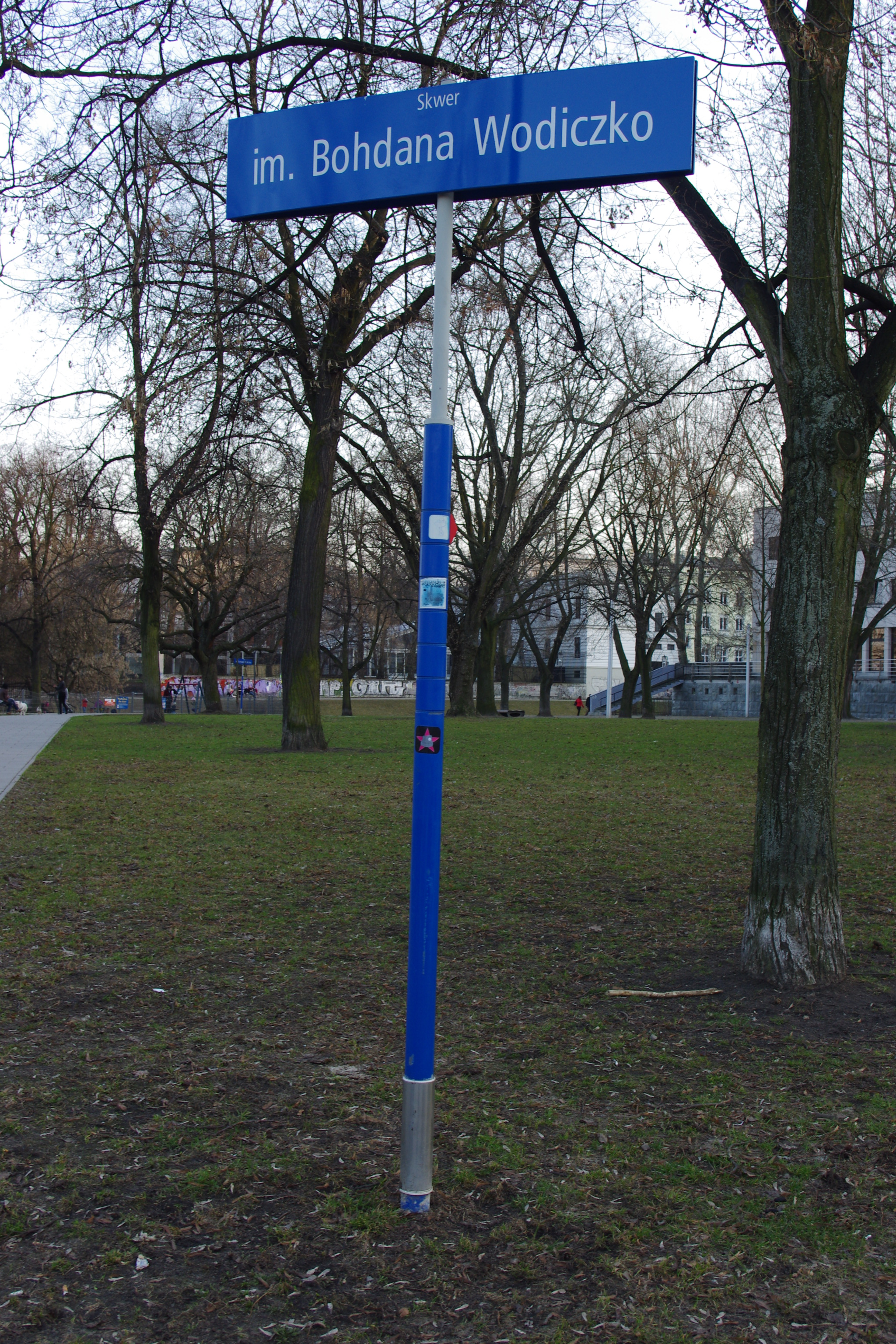 Skwer im. Bohdana Wodiczko w Warszawie